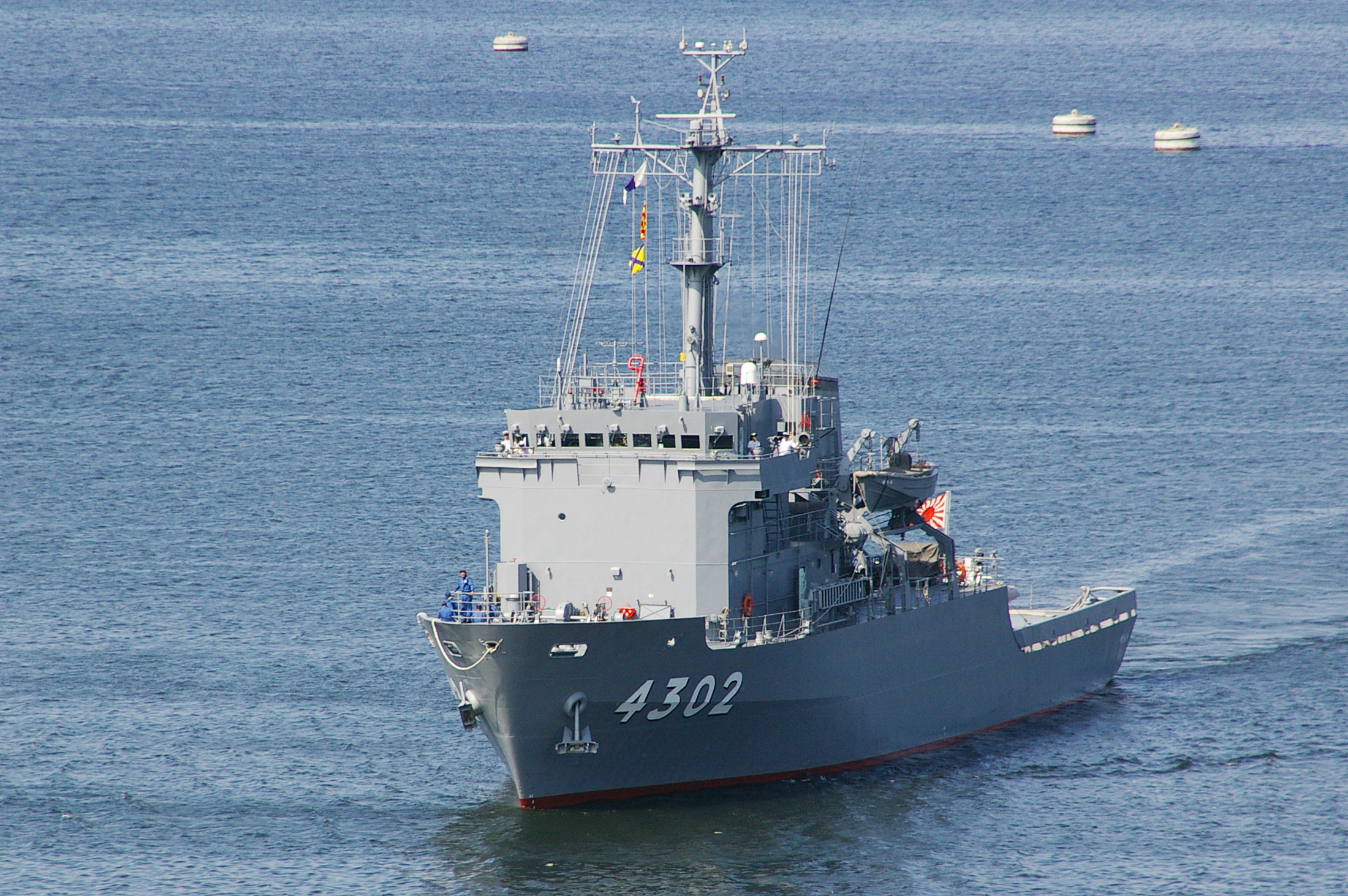 支援艦すおう。横須賀港・吉倉地区にて撮影。